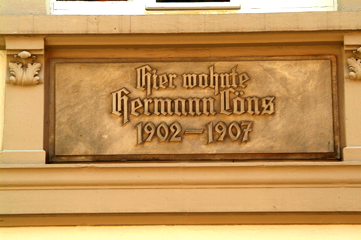 Spruch am Gebäude Am Bokemahle 8 in Hannover-Südstadt: "Hier wohnte Hermann Löns 1902 - 1907" ...